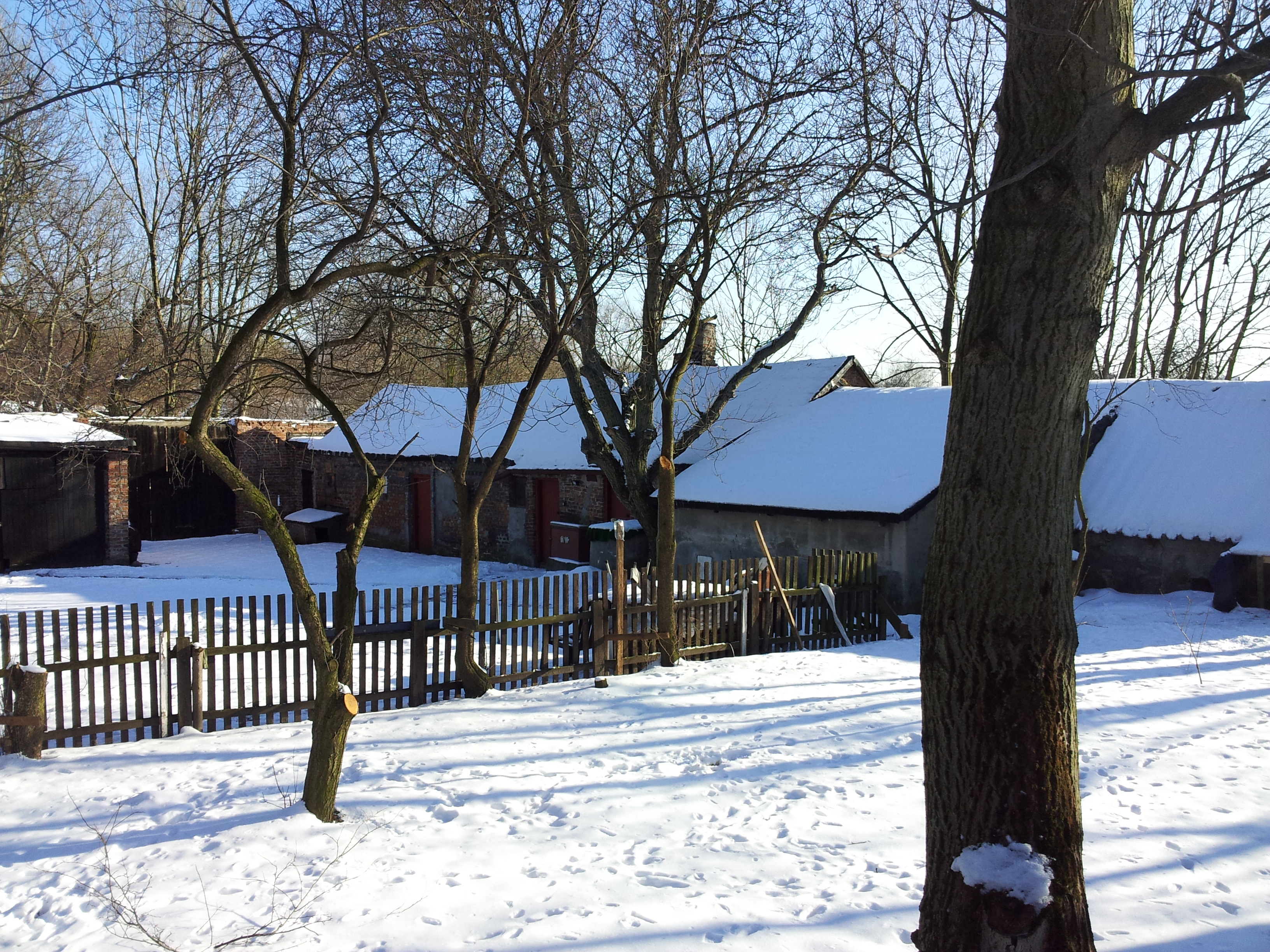 Tarniny 7, Warsaw